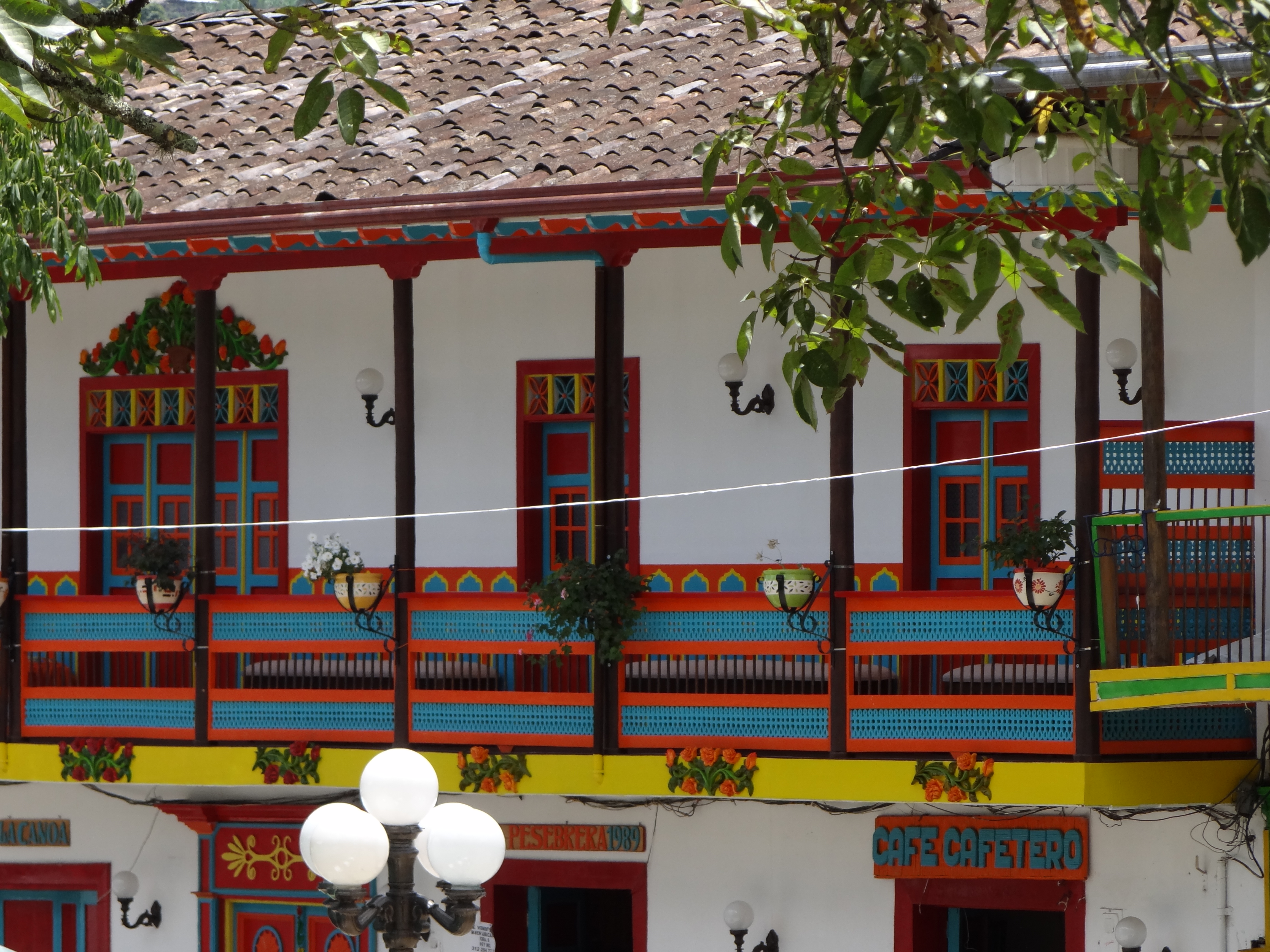 Conjunto de la Plaza Principal del Municipio el Jardín